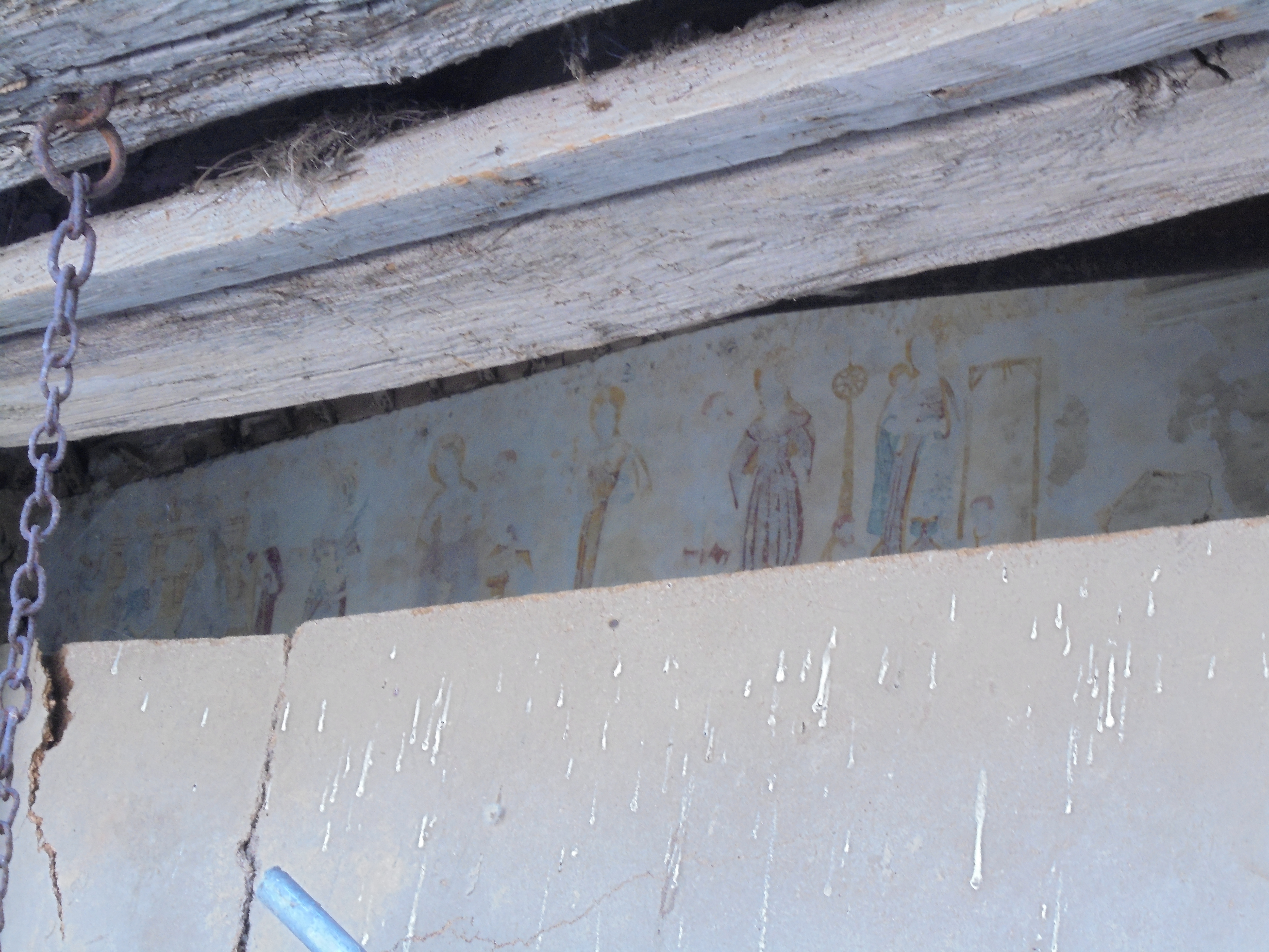 Les peintures murales de l'ancienne église Saint-Maximin, partie de la ferme abbatiale Saint-Laurent. Peinture réalisées vers 1520-1530.